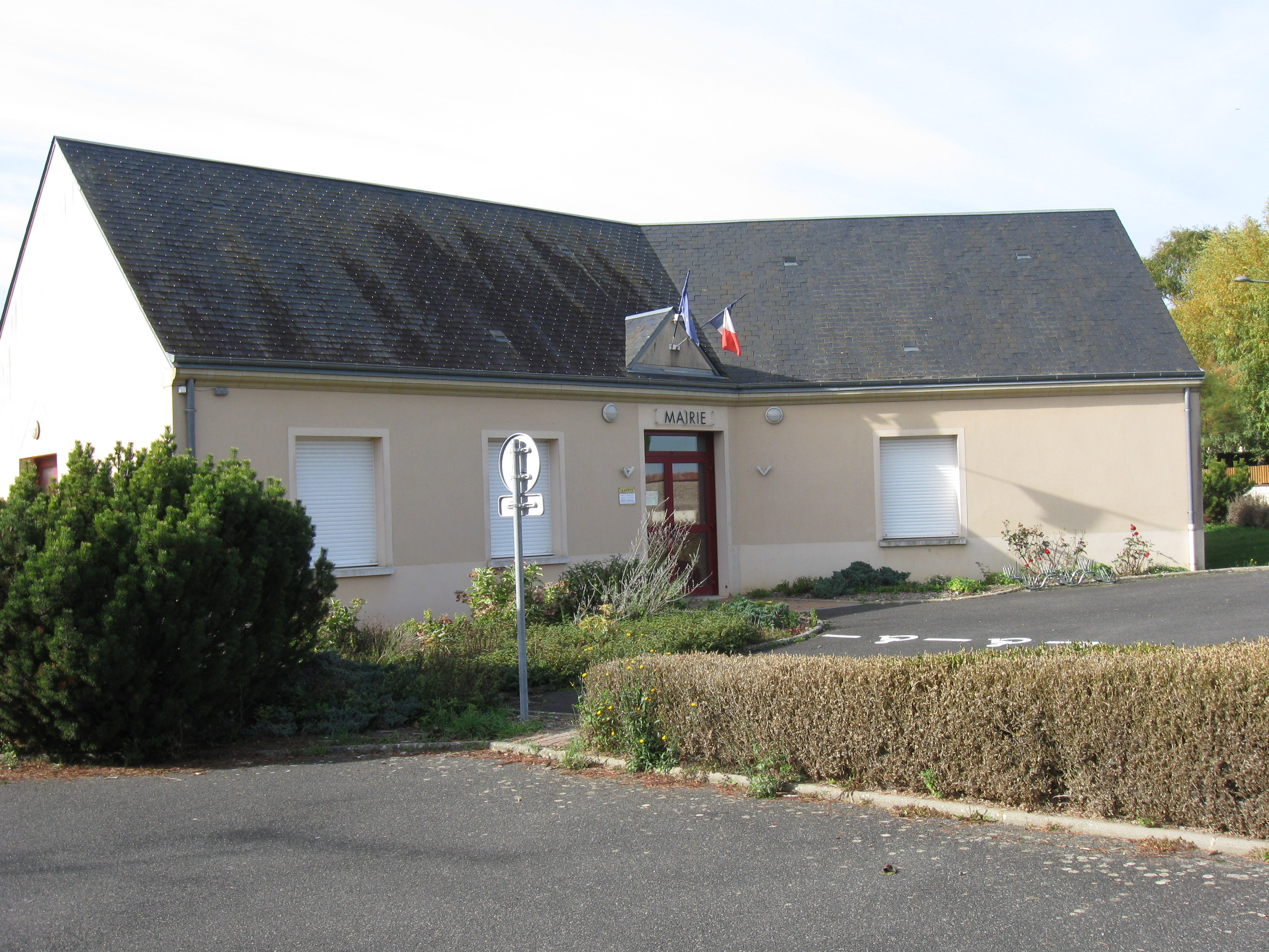 Mairie associée de Coudray. (Loiret, région Centre-Val de Loire).